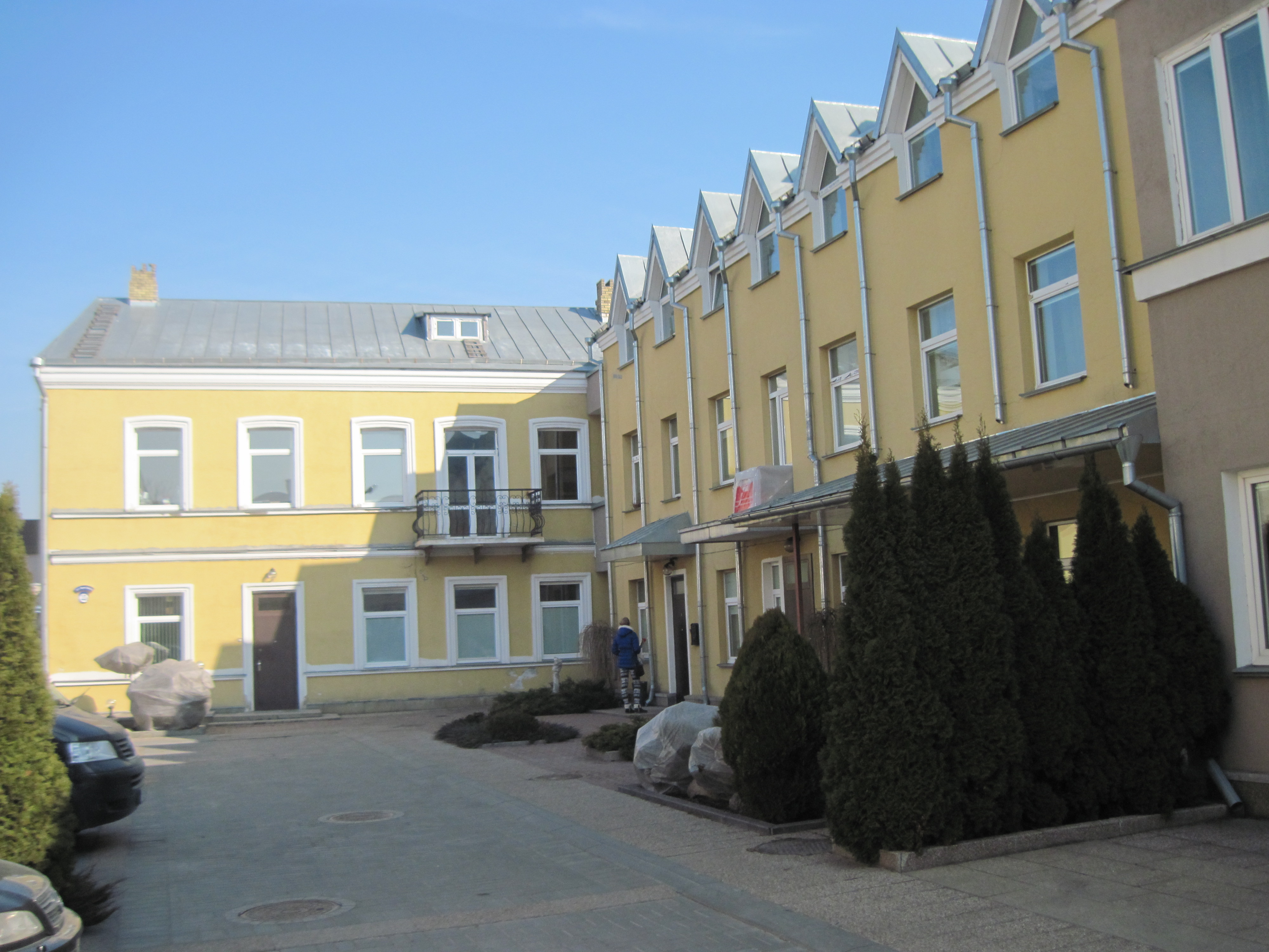 Забудова гістарычнага цэнтра Гродна. Вуліца К. Маркса, 16А